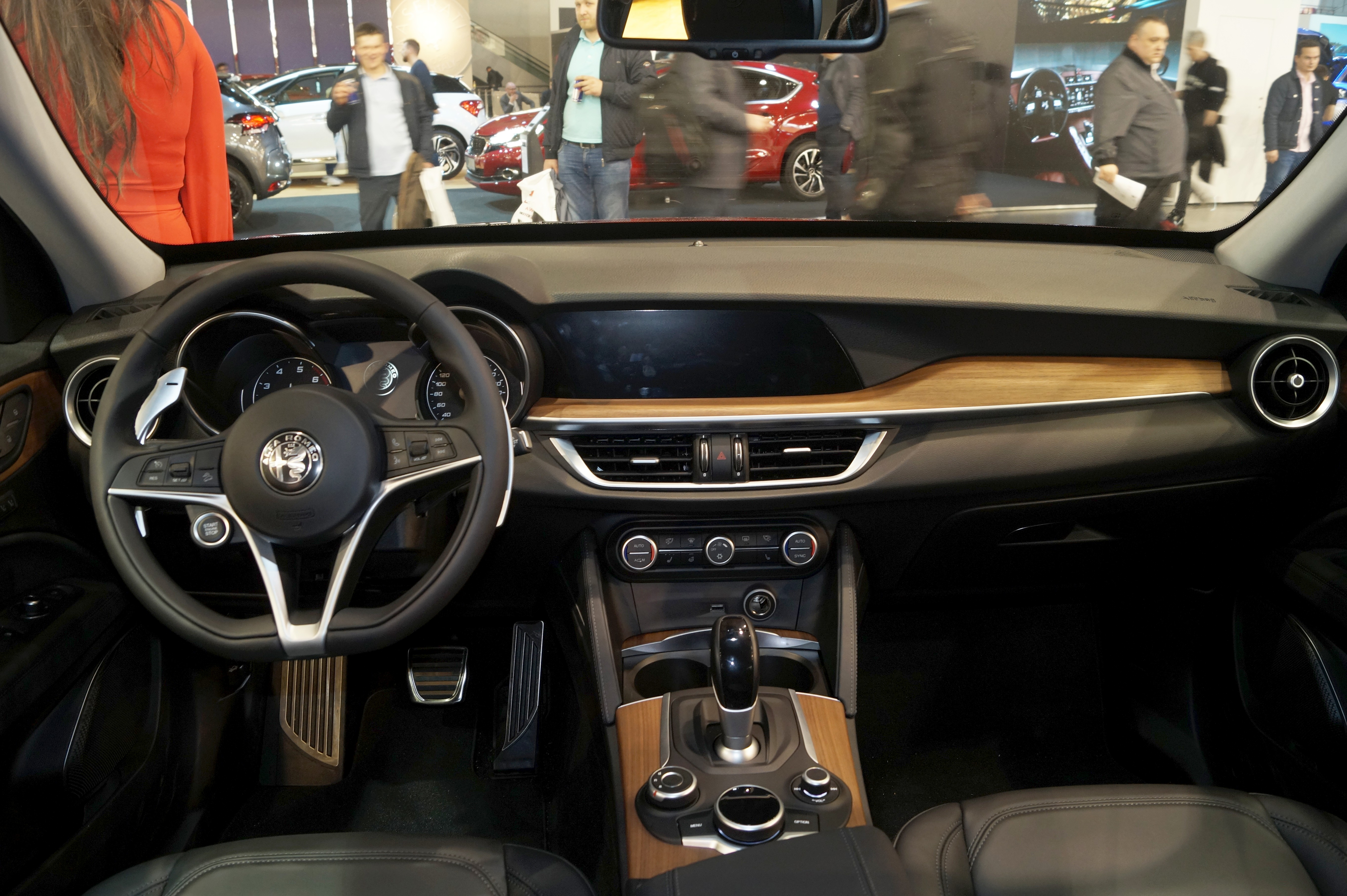 Wnętrze Alfy Romeo Stelvio na Motor Show Poznań 2017.